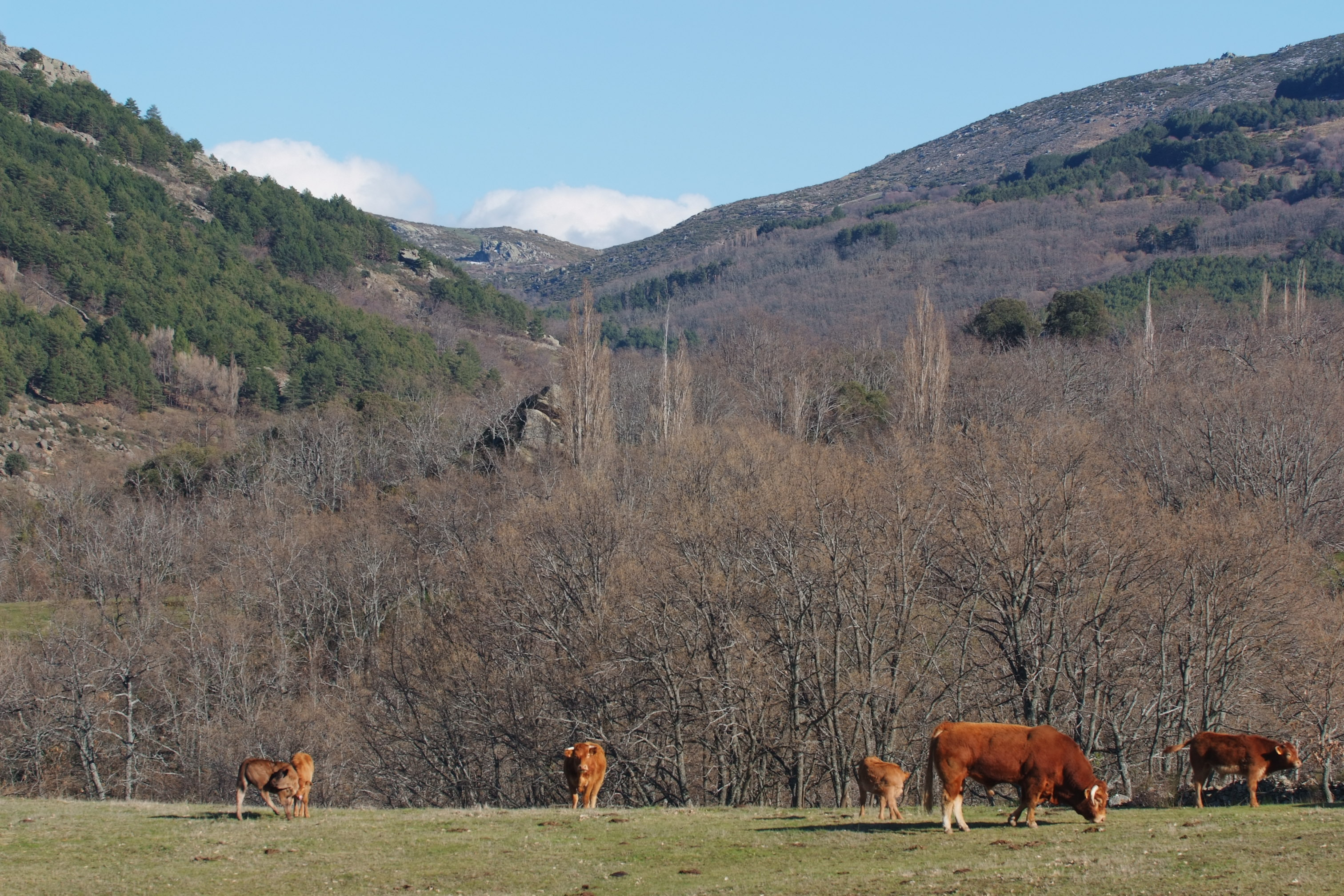 Ganado vacuno pastando en Villafranca de la Sierra (Ávila; España)